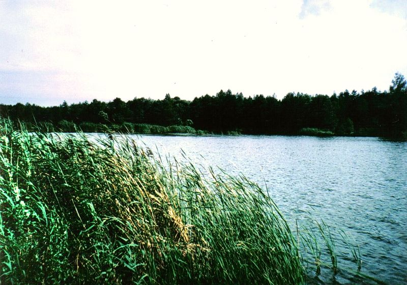 "Groble" ponds, Chrzanów, Poland